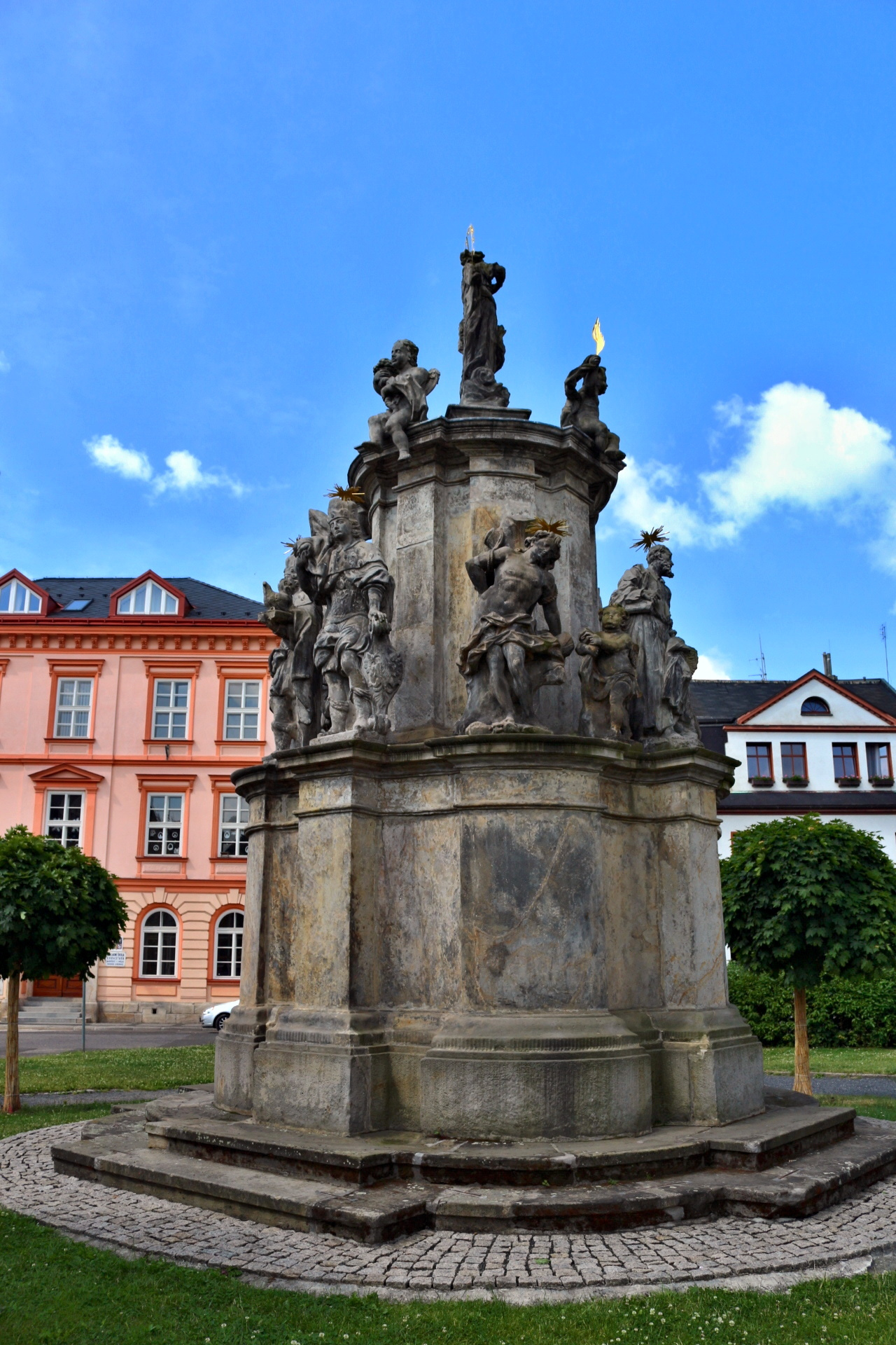 Chrastava